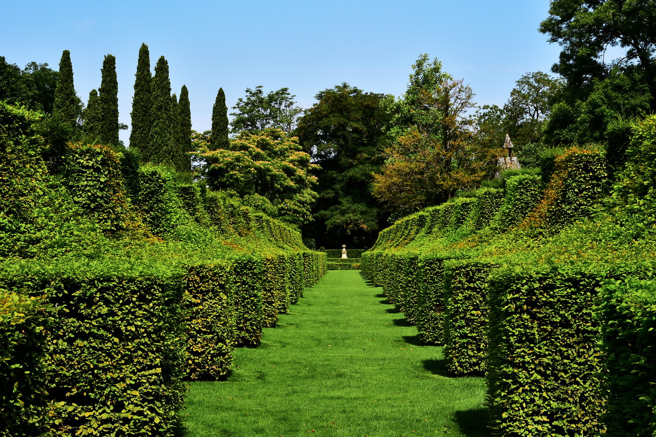 Jardins du Manoir d'Eyrignac, Perigord